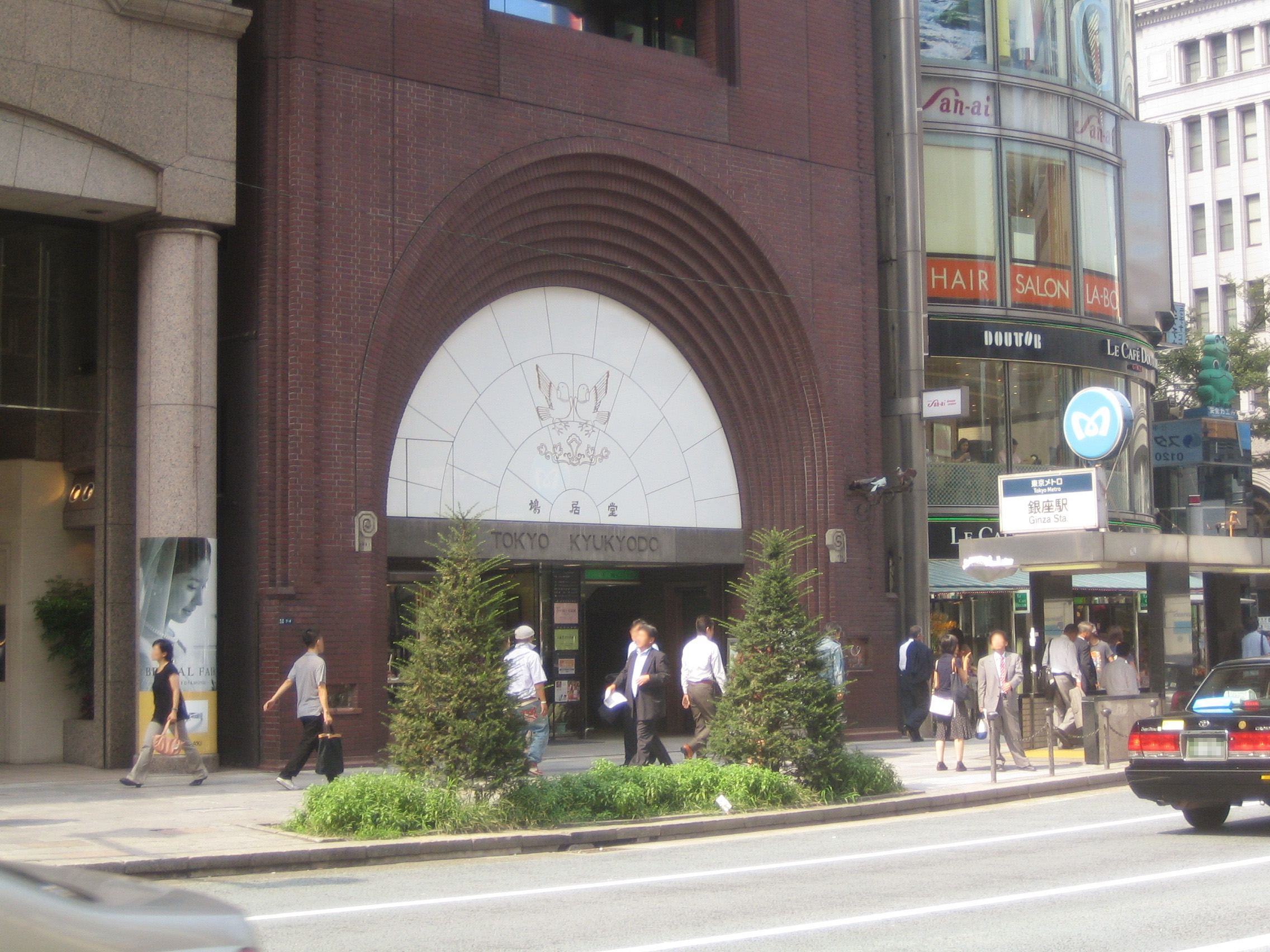 東京鳩居堂。東京都中央区銀座 Kyukyodo (鳩居堂 Kyūkyodō), at Ginza, Chuo, Tokyo, Japan